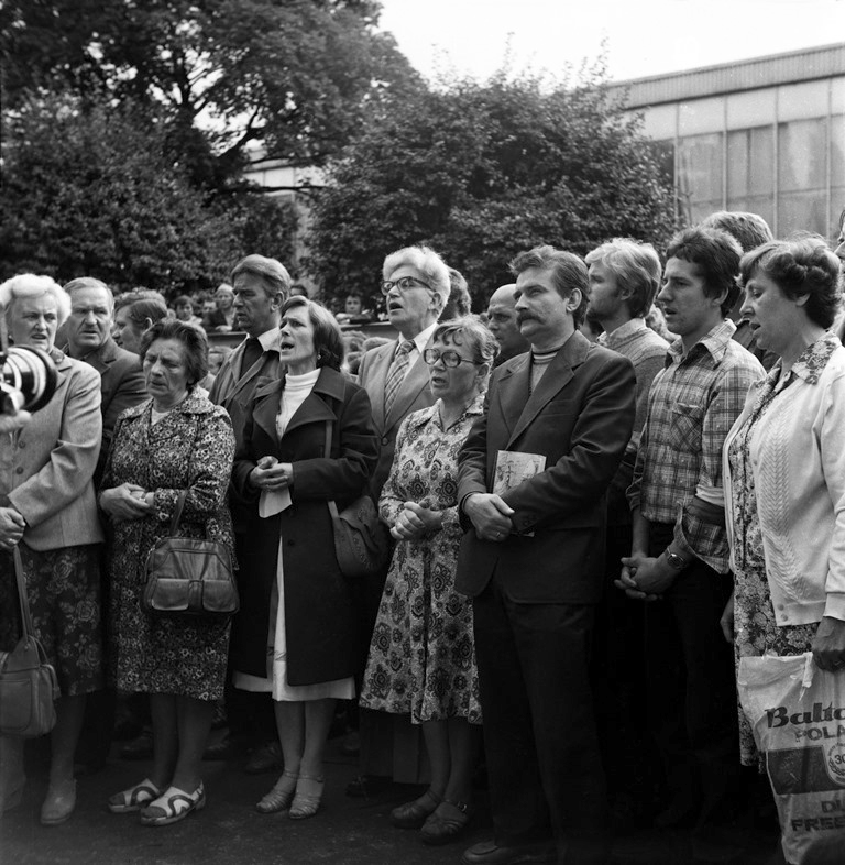 Lech Wałęsa i Anna Walentynowicz, za nimi Romuald Kukołowicz (w okularach) podczas mszy świętej celebrowanej na terenie Stoczni Gdańskiej im. Lenina